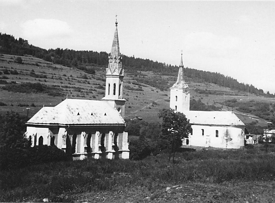 Ruskinovce